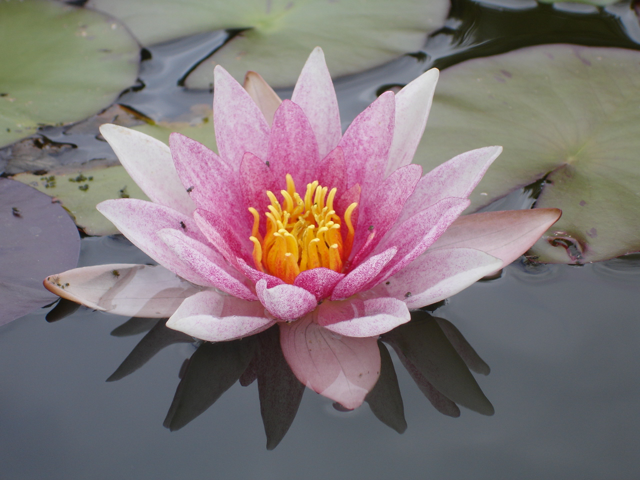 Nymphaea laydekeri 'Lilacea'